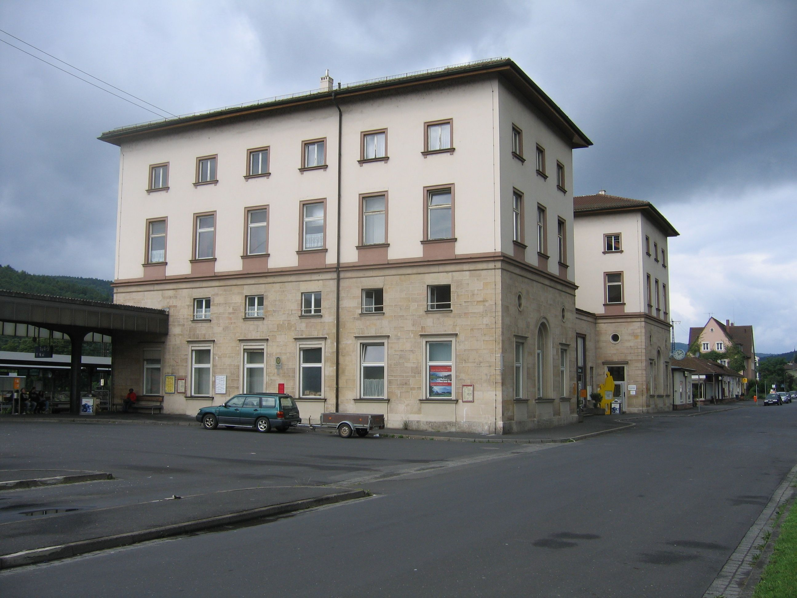 Bahnhof Gemünden, Straßenseite